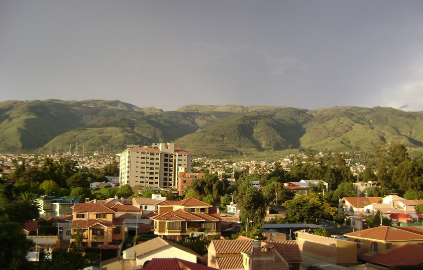 Imagen de la ciudad